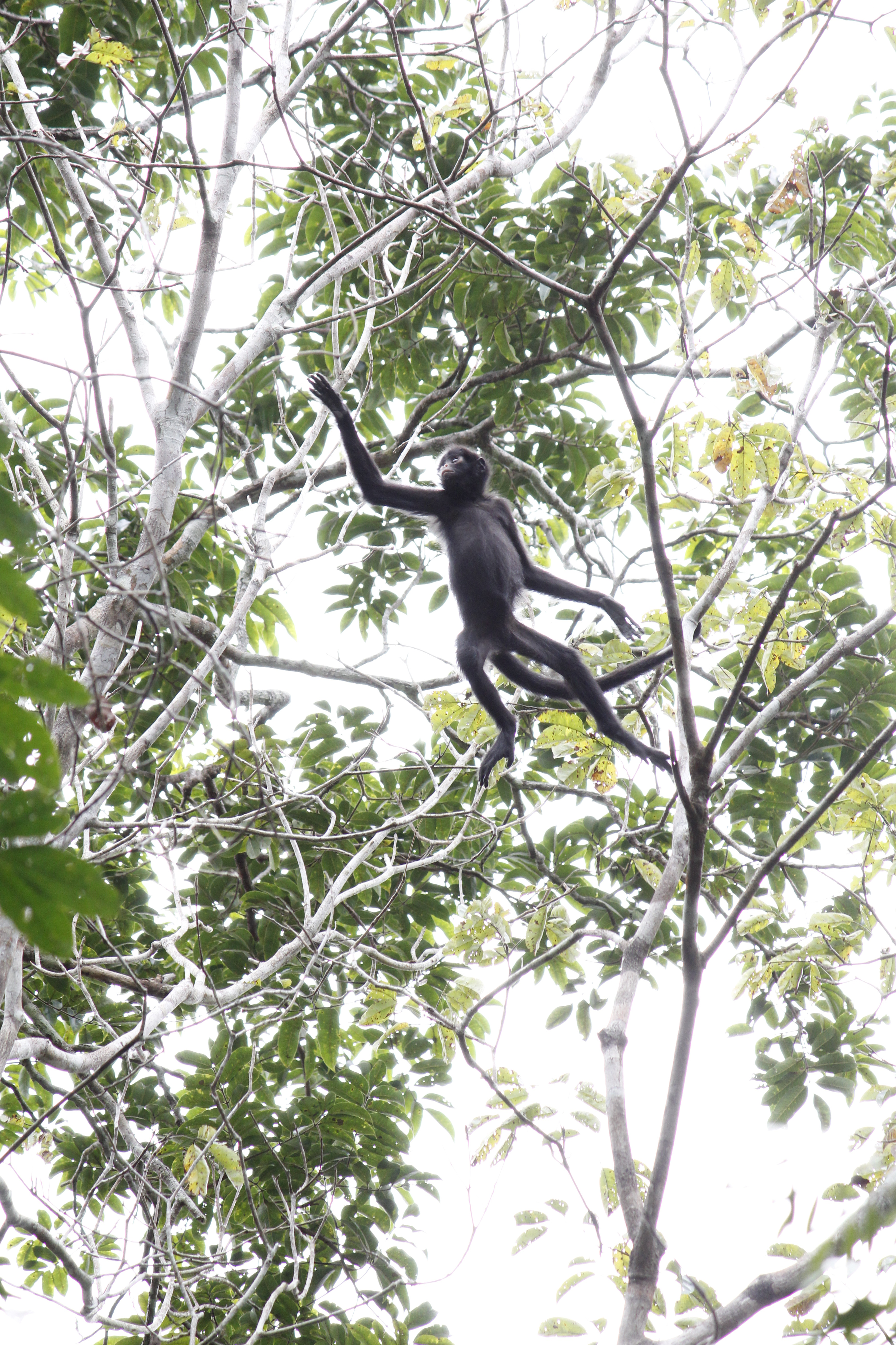 Salto flagrado do macaco aranha